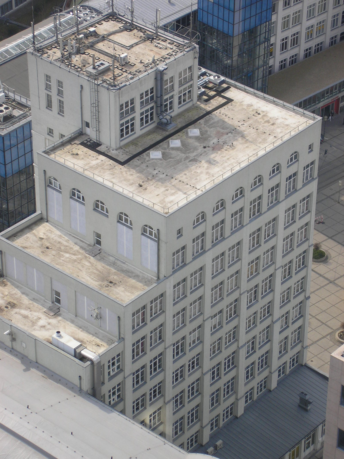 Der Bau 15 in Jena (Thüringen).